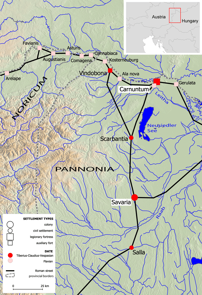 Pannonien, Carnuntum, Savaria, Vindobona